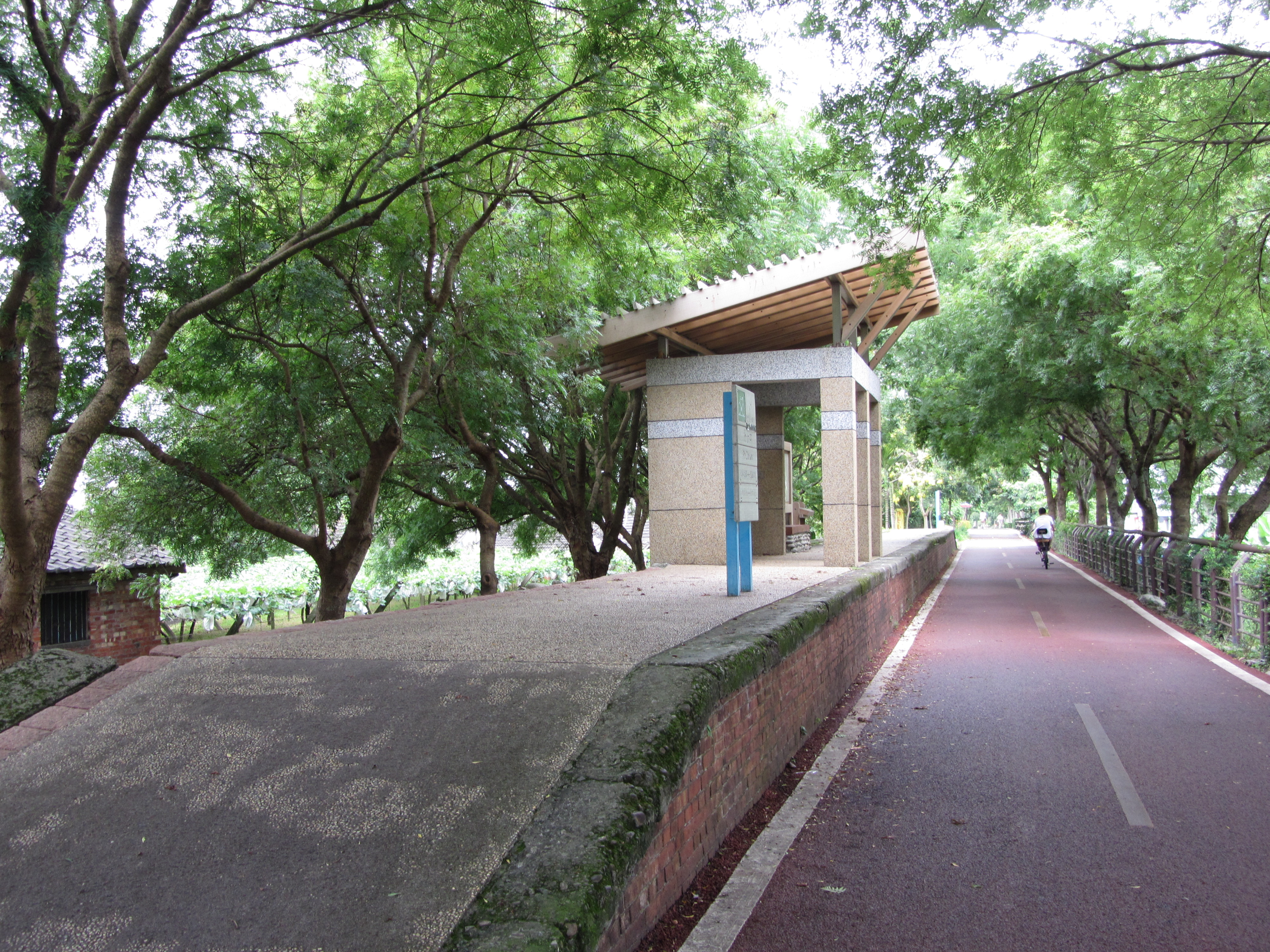 舊東勢線朴口車站2012年狀況。